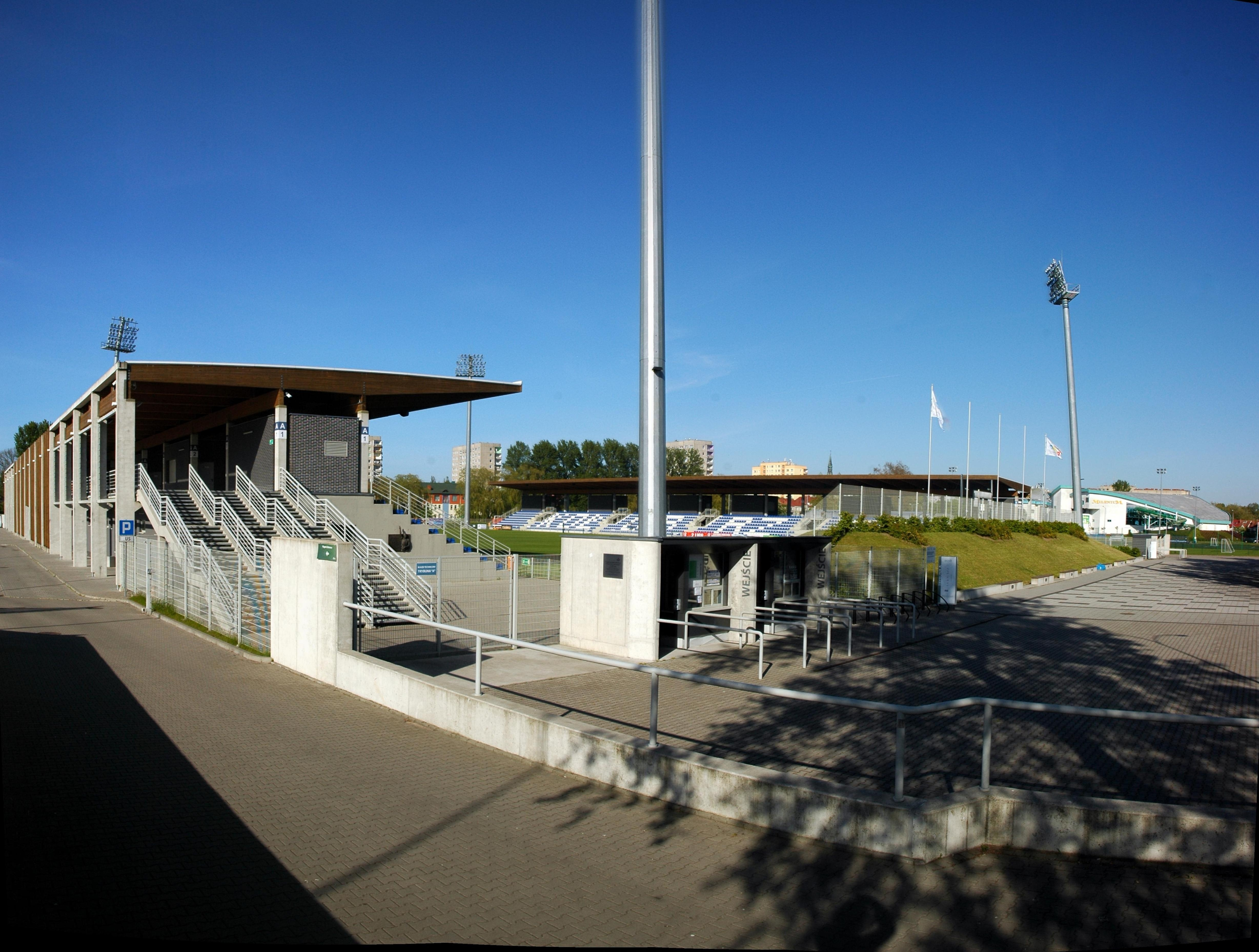 Stadion im. Sebastiana Karpiniuka w Kołobrzegu